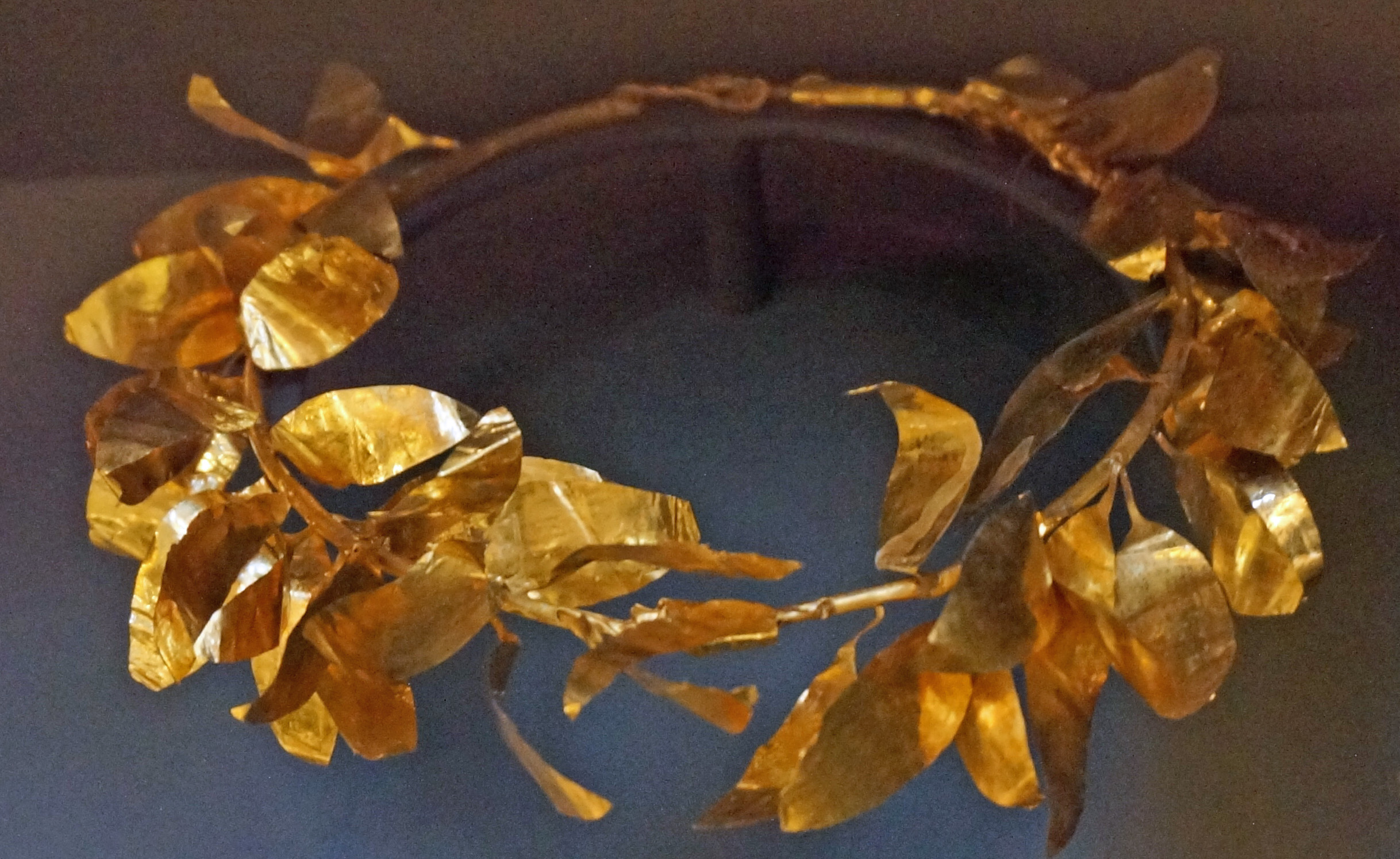 de la tombe Z à Derveni.